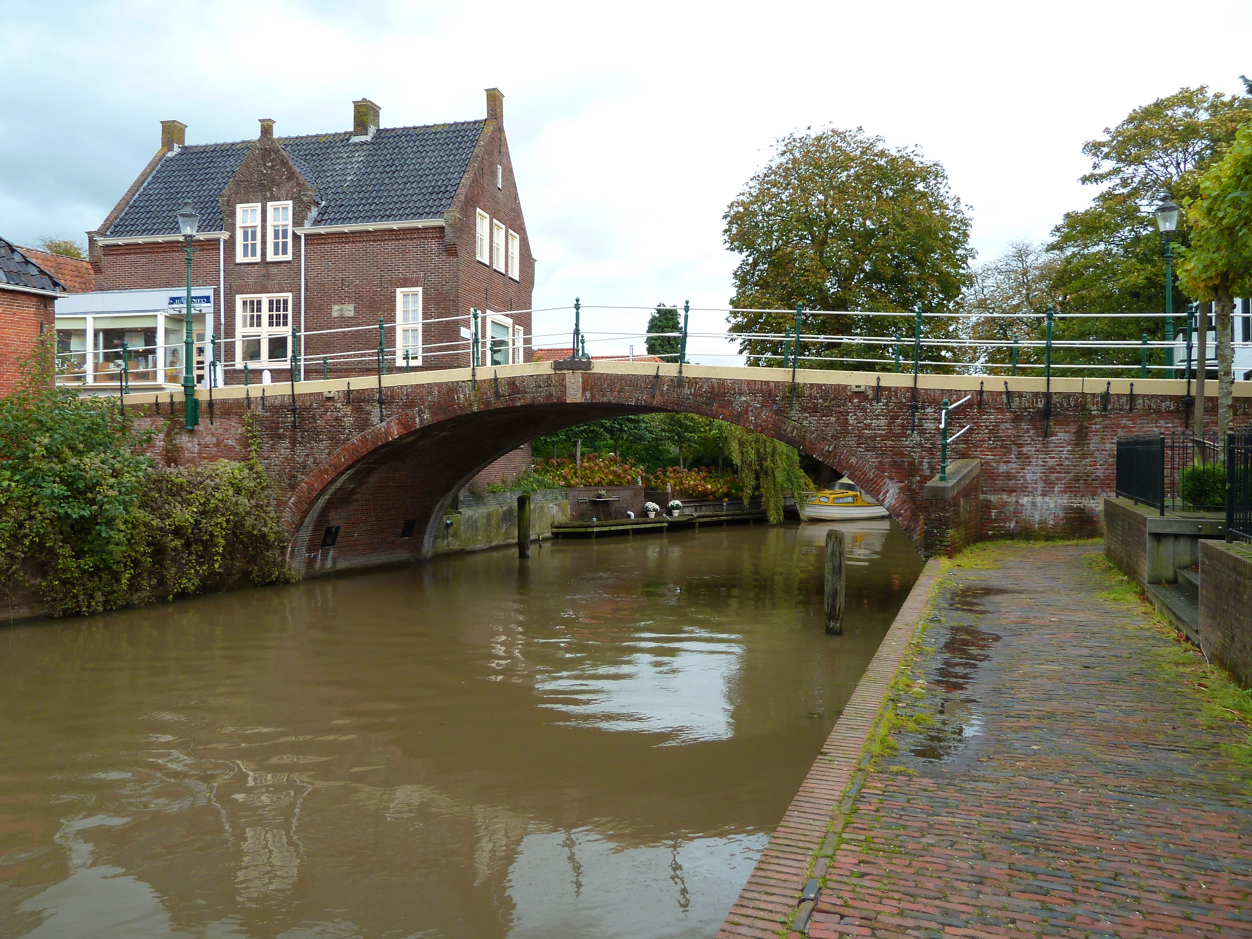 De Boog, de stenen brug over het Winsumerdiep tussen de Winsumer dorpsdelen Obergum (links) en Winsum (rechts). Gebouwd in 1808, herbouwd in 1941.